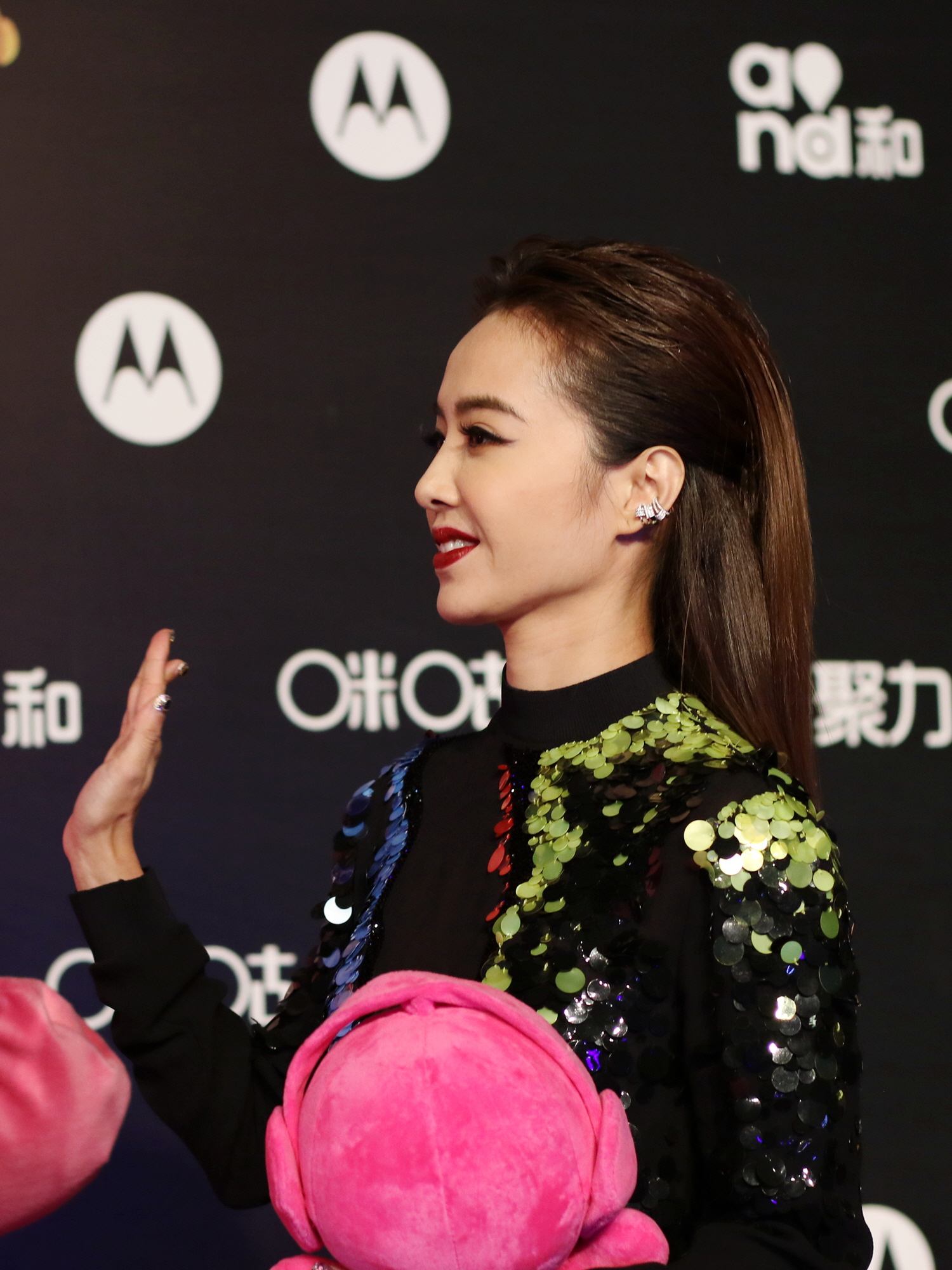 上海 咪咕颁奖礼红毯